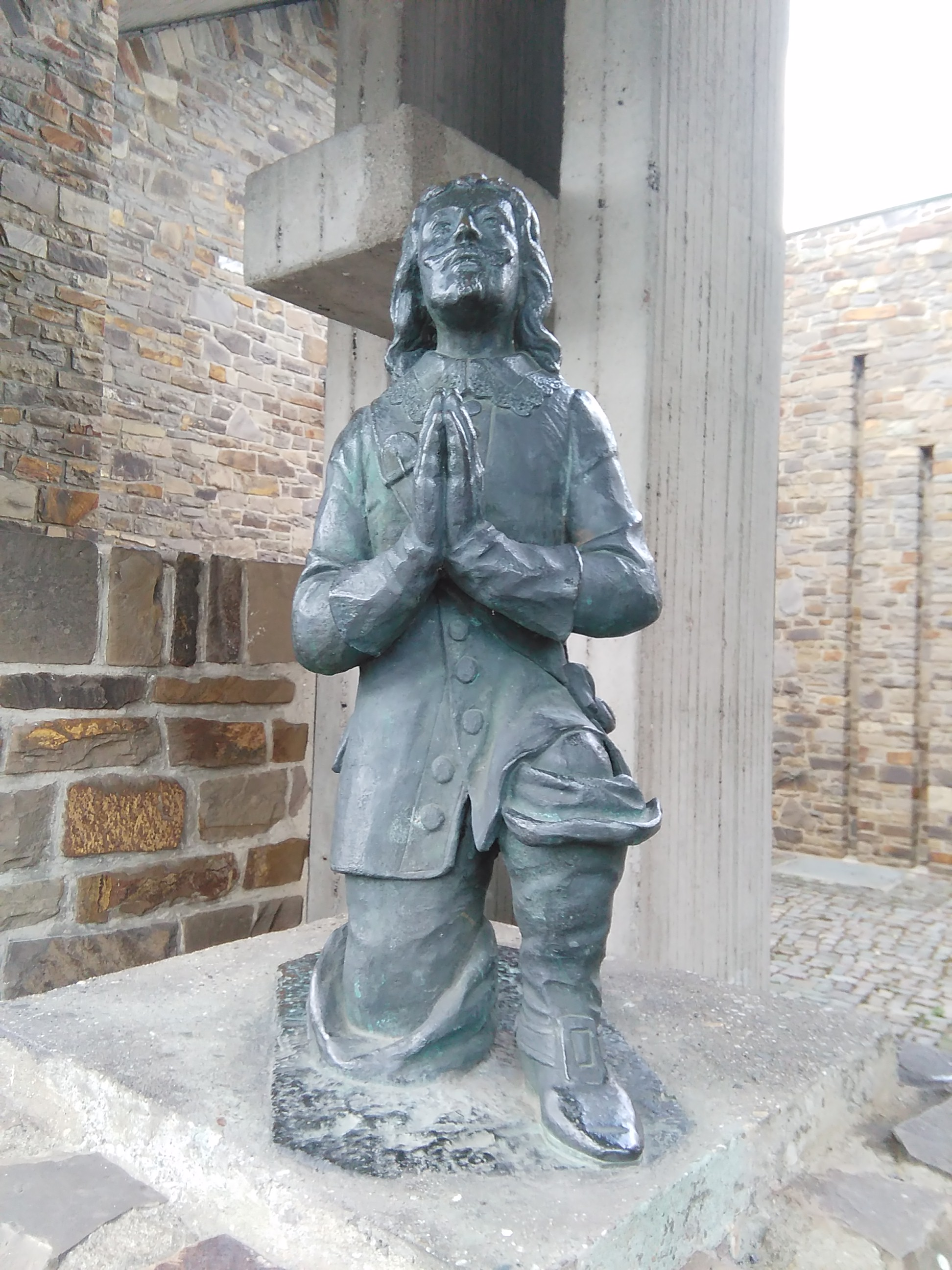 beeld van Jan Von Werth aan de ingang van de Sint Aldegundiskerk in Büttgen.